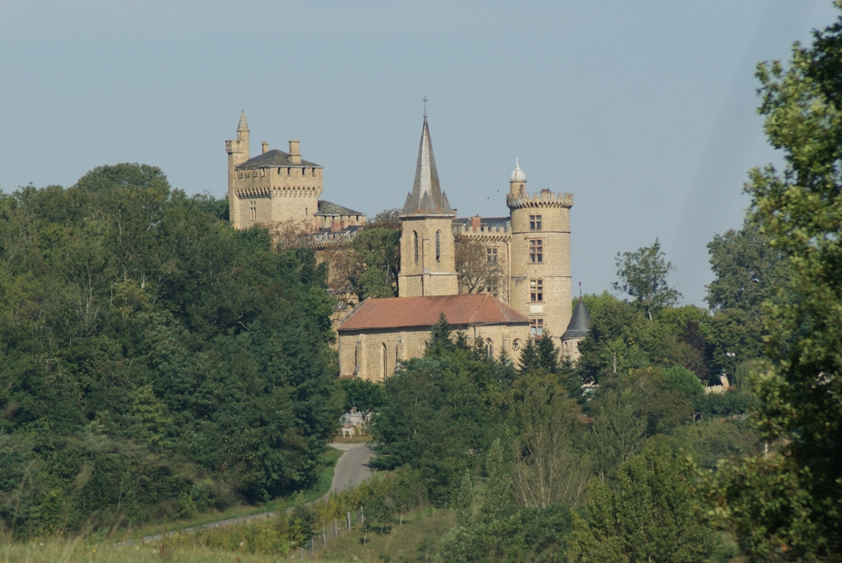 De oostzijde van het kasteeel.